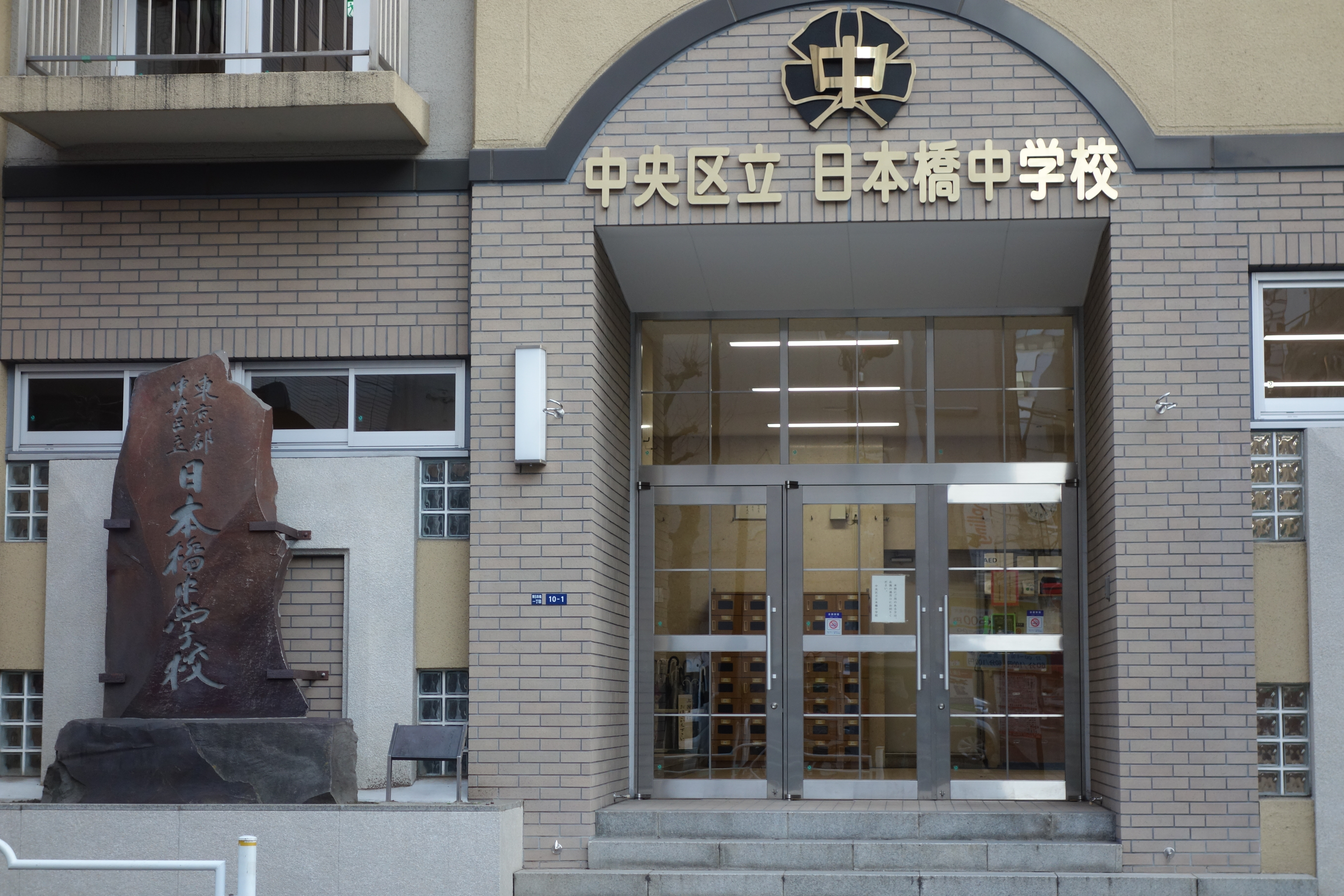 中央区立日本橋中学校 正門